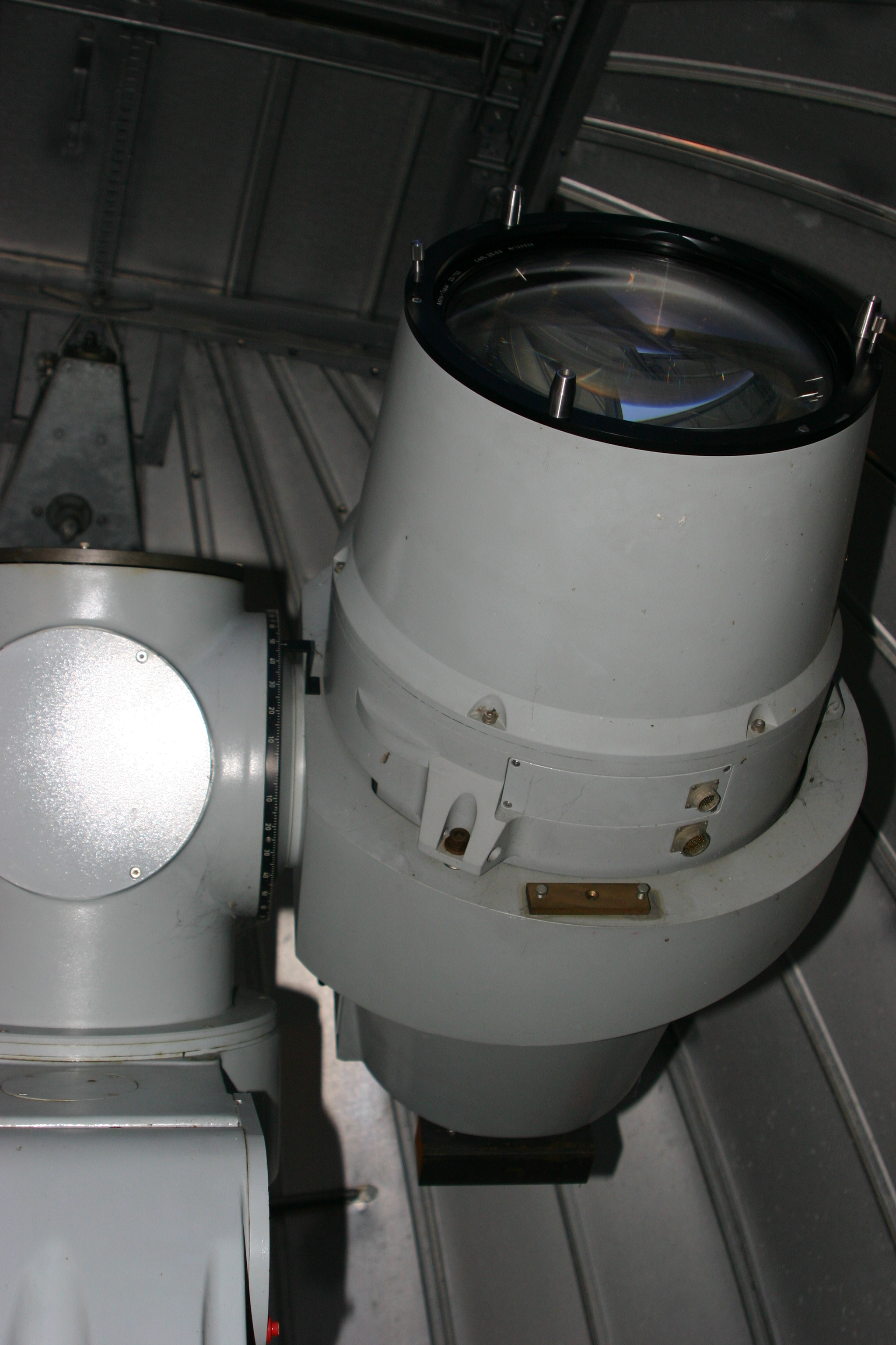 Zeiss Ballistische Messkammer mit 75 cm Brennweite, 18x18cm Bildfeld und Blende 1:2,5